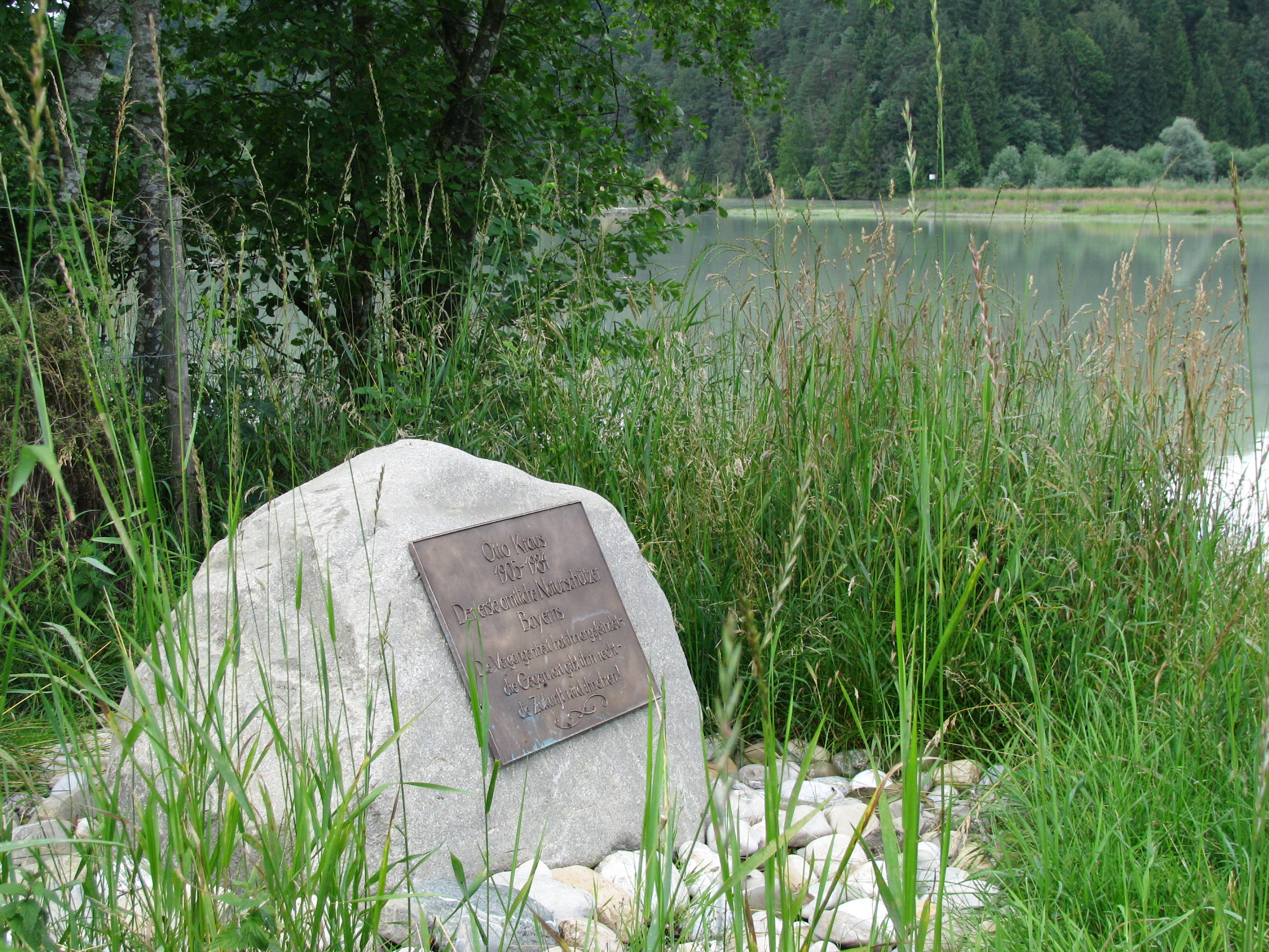 Gedenkstein für Otto Kraus am Lech bei Niederwies.